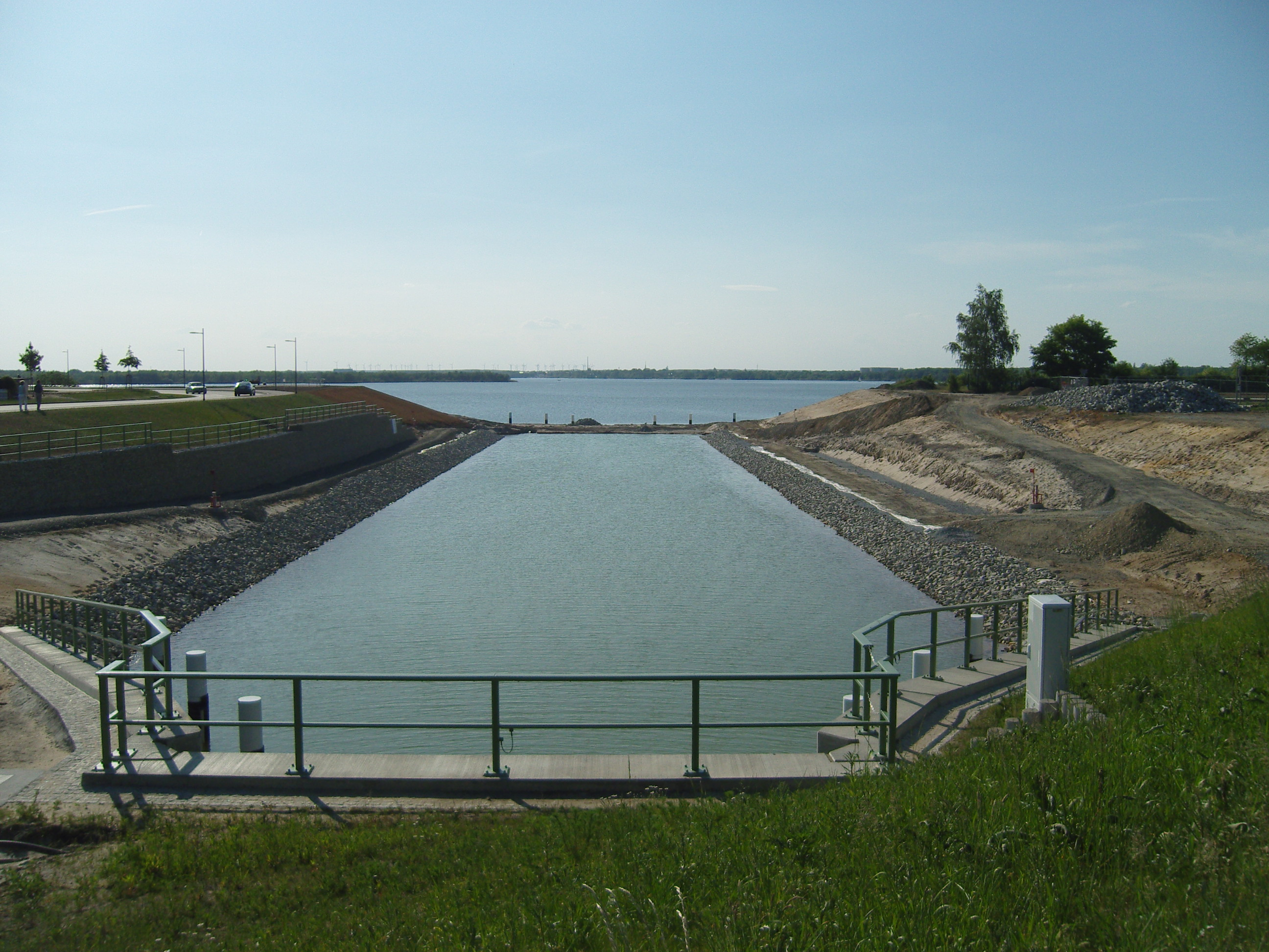 Koschener Kanal, Blick zum Senftenberger See